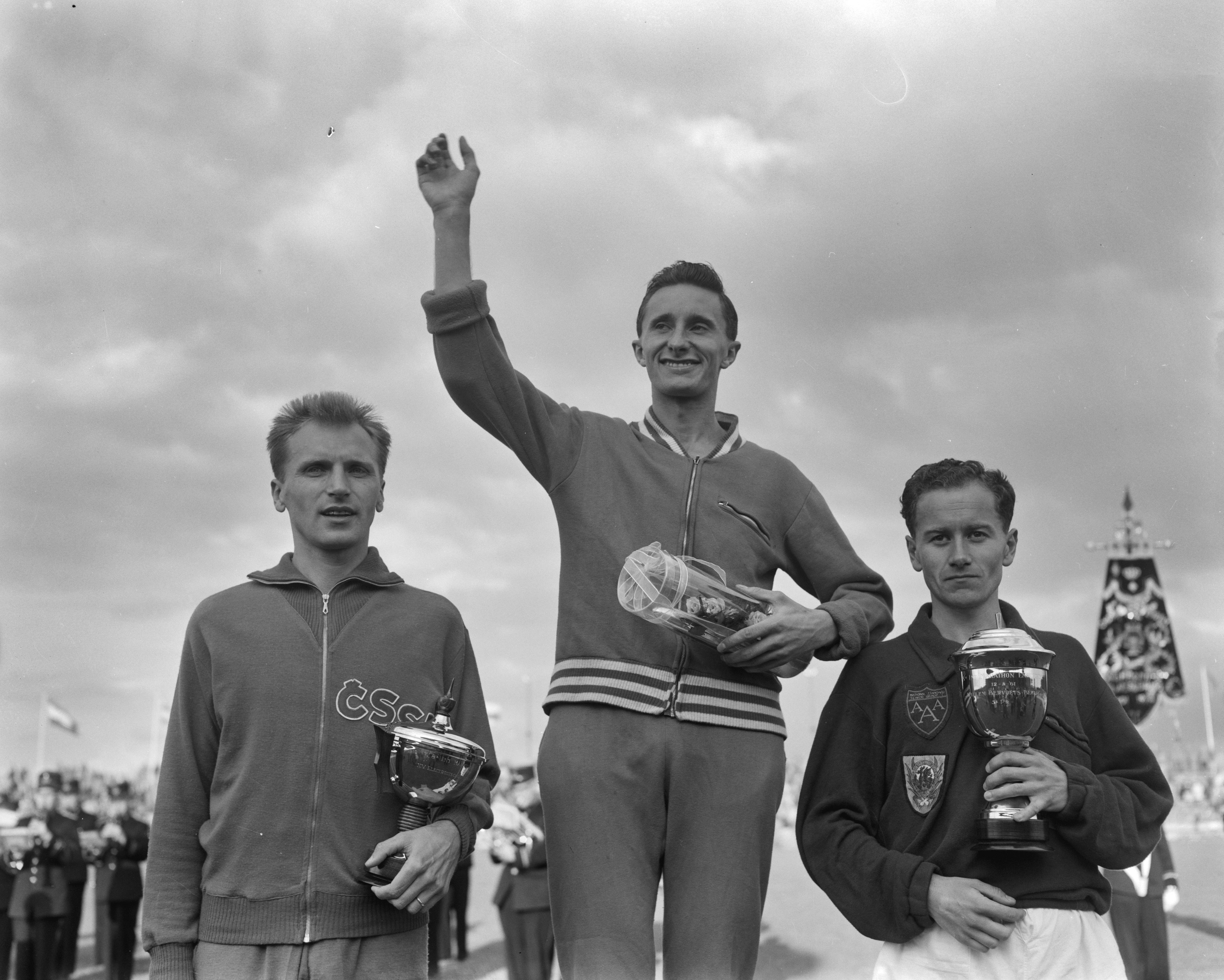 Collectie / Archief : Fotocollectie Anefo Reportage / Serie : [ onbekend ] Beschrijving : Internationale marathonloop. Overzicht marathon. Van links naar rechts: Pavel Kantorek (2), Peter Wilkinson (1) en Ron Franklin (3) Datum : 12 augustus 1961 Trefwoorden : MARATHONS, overzichten Fotograaf : Bilsen, Joop van / Anefo Auteursrechthebbende : Nationaal Archief Materiaalsoort : Negatief (zwart/wit) Nummer archiefinventaris : bekijk toegang 2.24.01.04 Bestanddeelnummer : 912-8338